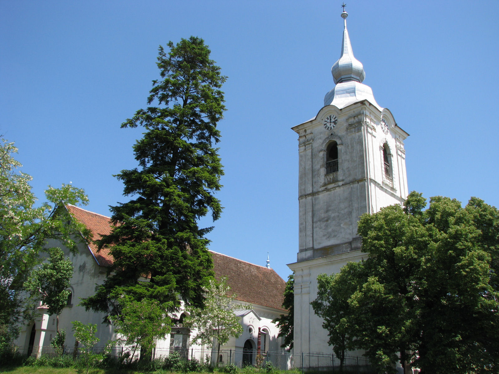 Lécfalvi református templom